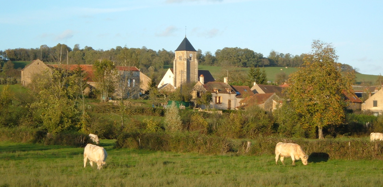 le bourg de Provency (Yonne)